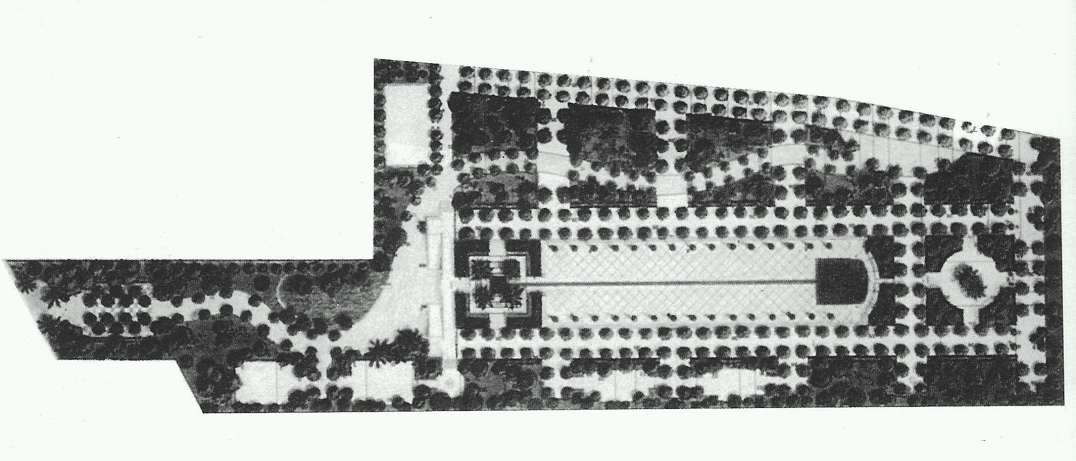 Planta de la ordenación (Daniel Navas, Neus Solé, Imma Jansana)